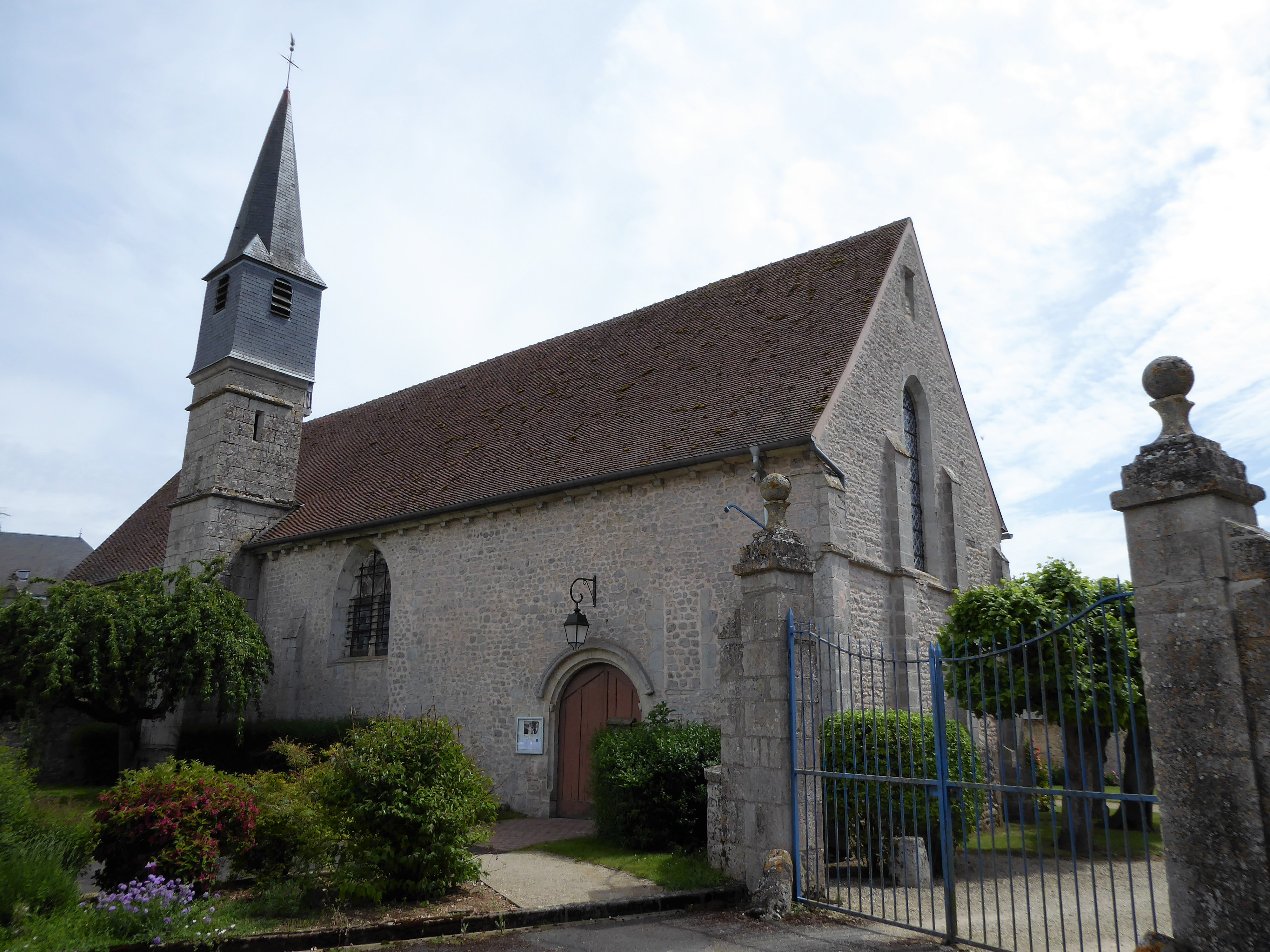 église Saint-Lubin, Prasville, Eure-et-Loir, France.